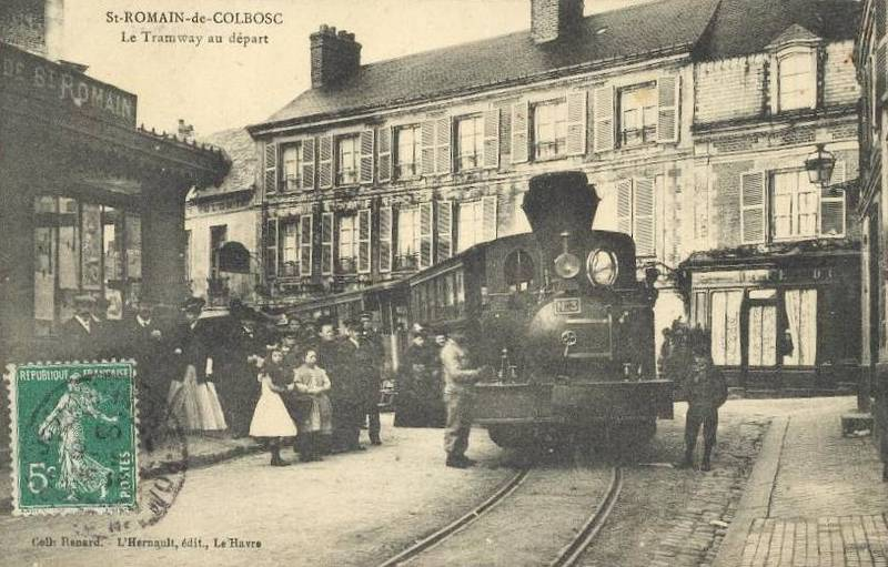 Carte postale ancienne éditée par L'Hernault au Havre (collection Renard) : Saint-Romain-de-Colbosc - Le Tramway au départ. Vue en gros plan du tramway de Saint-Romain-de-Colbosc devant son terminus de l'église de Saint-Romin, tracté par la locomotive n°3 (Corpet Louvet n°682 de 1897).